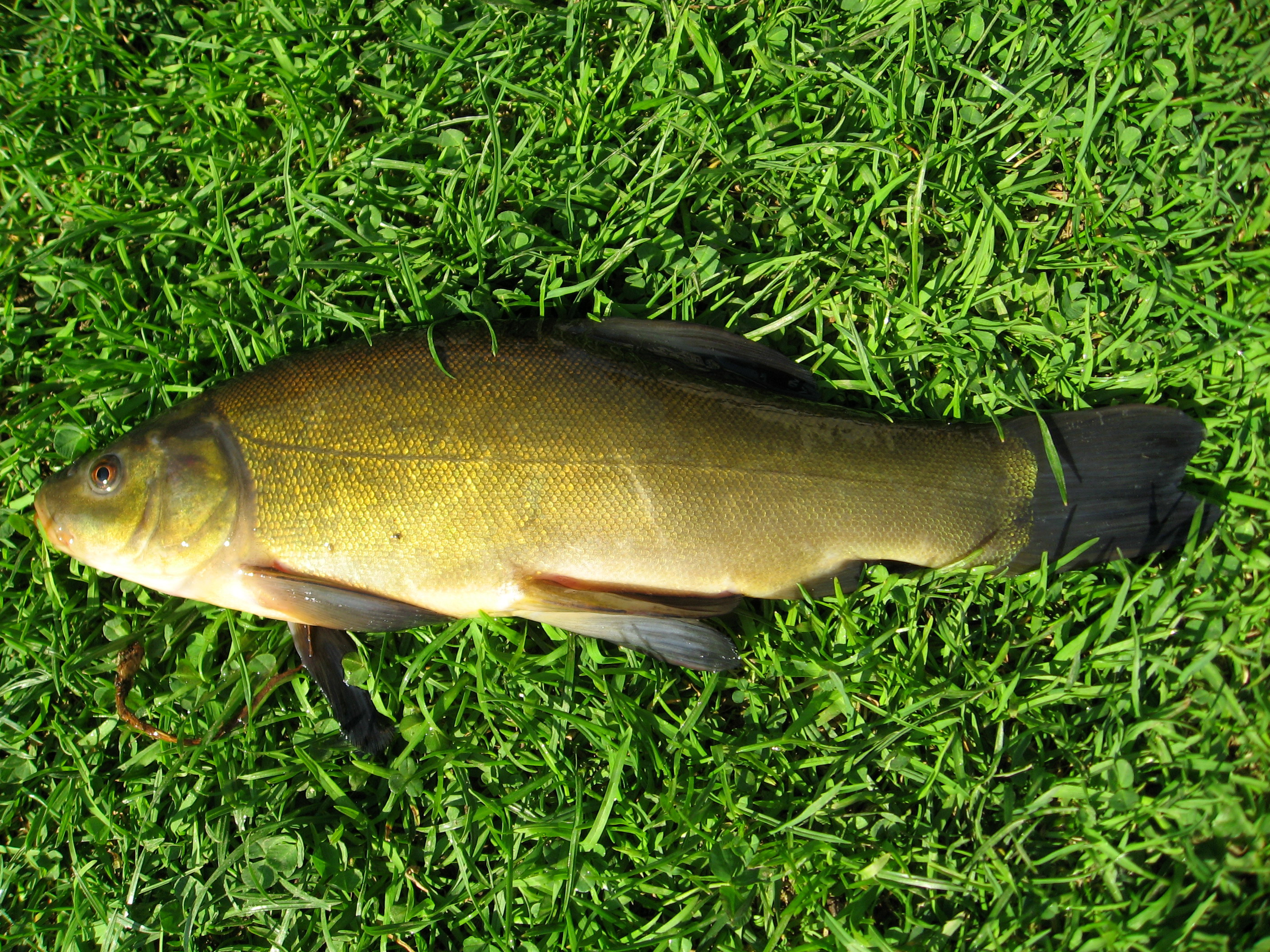 Lín obecný